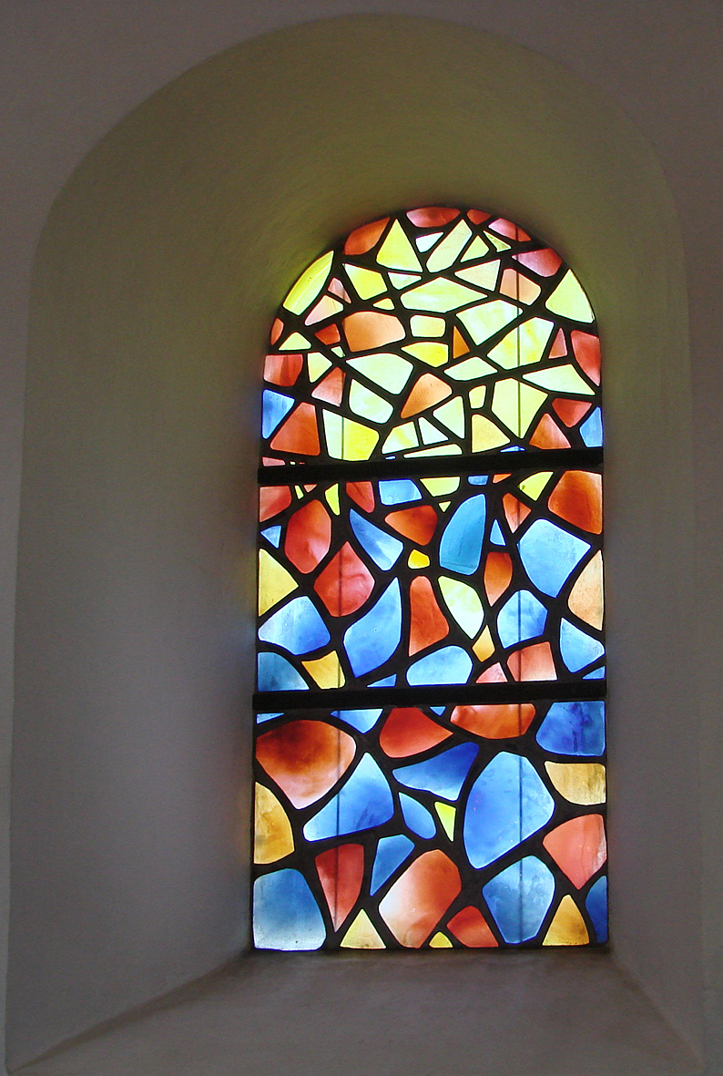 Glasmosaik Malling Kirke Jylland, Denmark